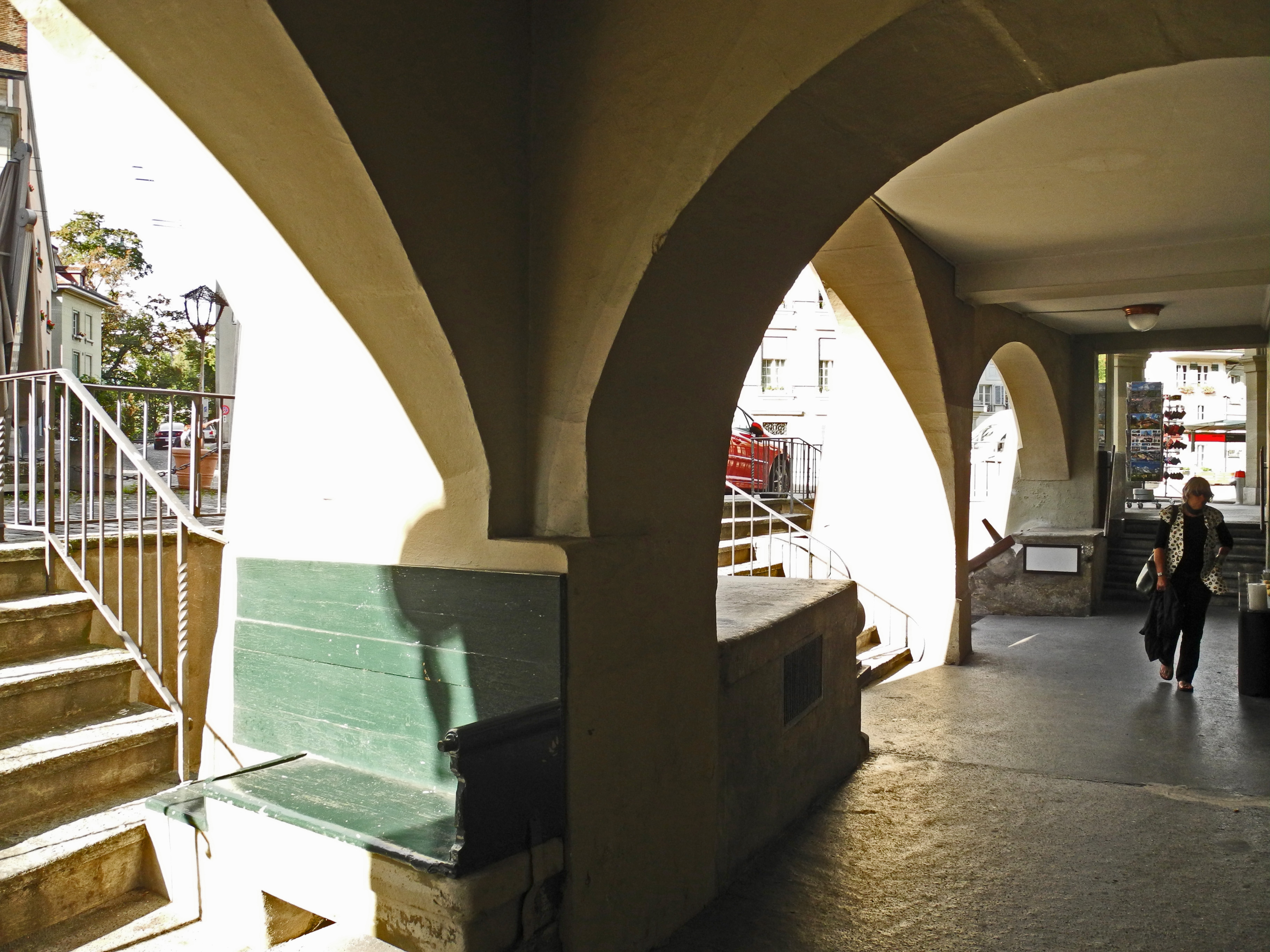 Laube unter Strassenniveau bei Junkerngasse 1, Bern